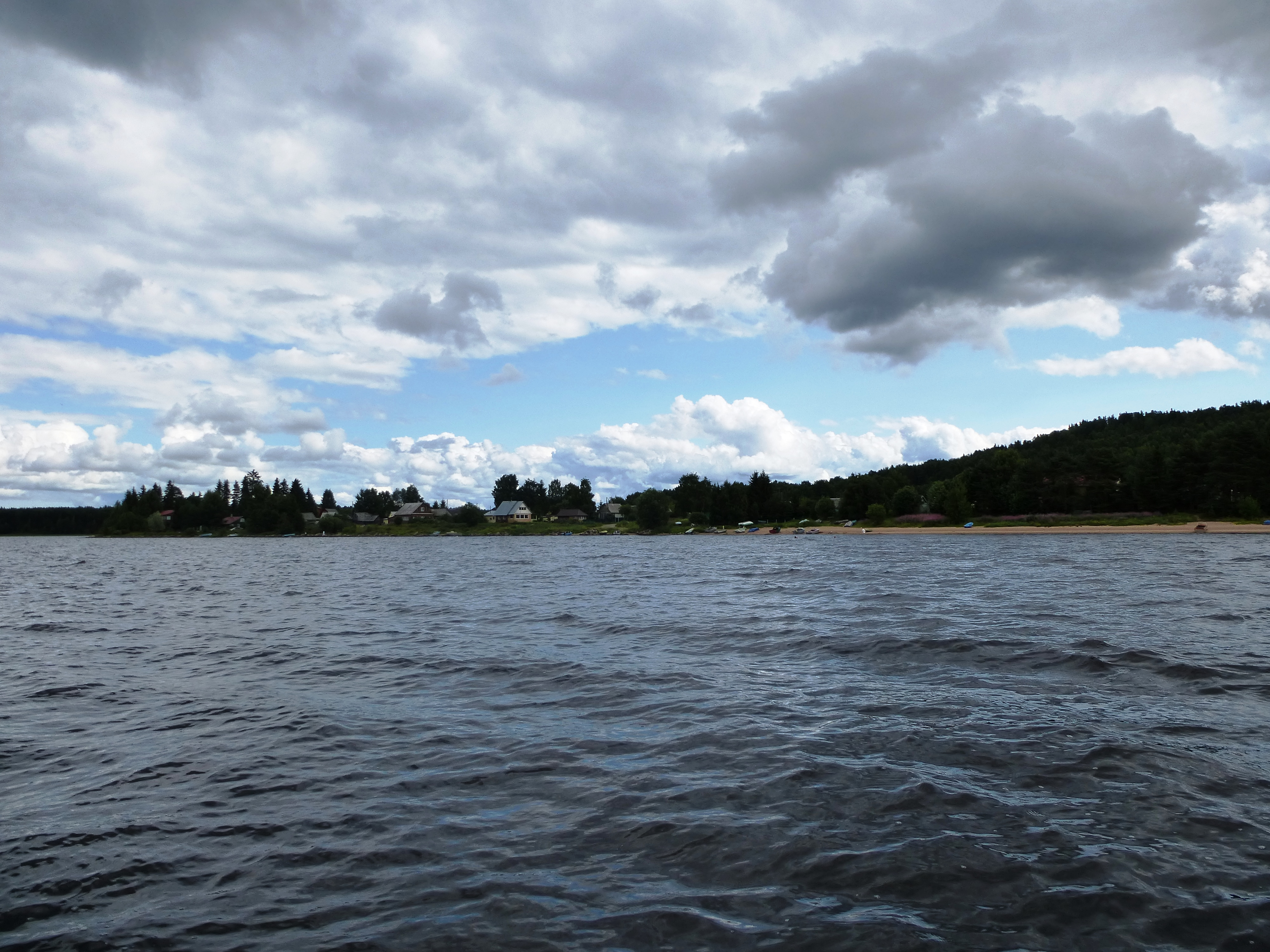 Деревня Салменица в Пряжинском районе Республики Карелия. Вид с озера Шотозеро.